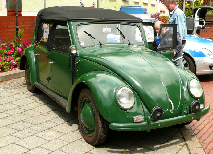 VW Käfer Cabrio der Polizei, vermutlich Baujahr um 1950, ausgestellt beim Tag der Niedersachsen 2009 in Hameln, vermutlich Hersteller Firma Franz Papier aus Köln, um 200 dieser Polizeifahrzeuge wurden von Papler produziert, 150 nutzte die Polizei, es sollen noch 2 Exemplare vorhanden sein, Foto eines alten Exemplars siehe hier: [1]